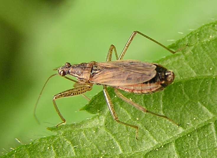 Nabis rugosus an einem Waldrand in der Nähe des Ahrtals.